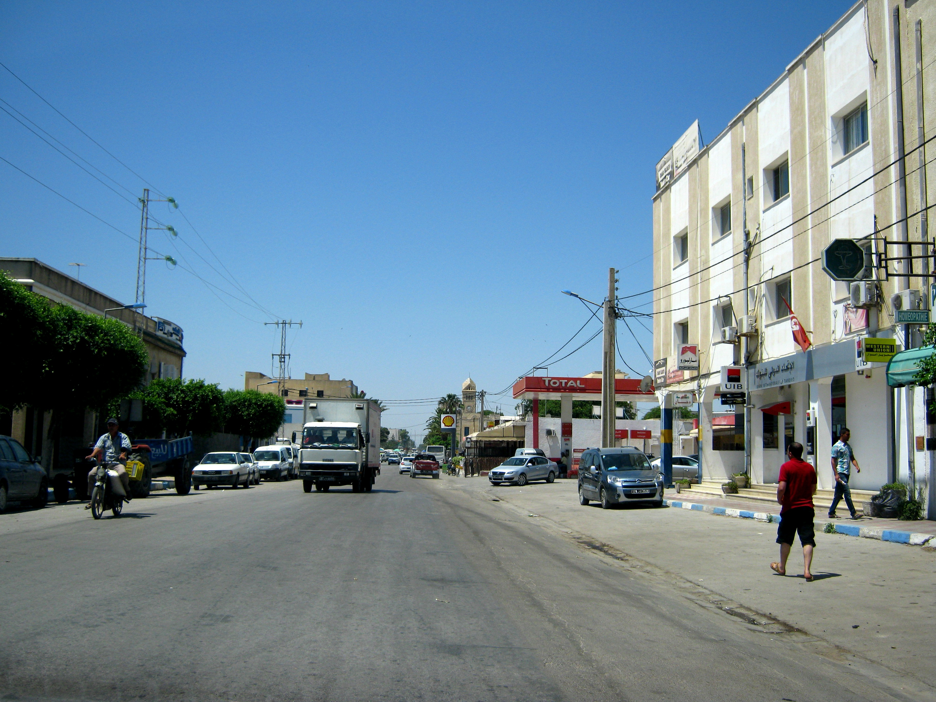 Улица Бургибы (Енфида)